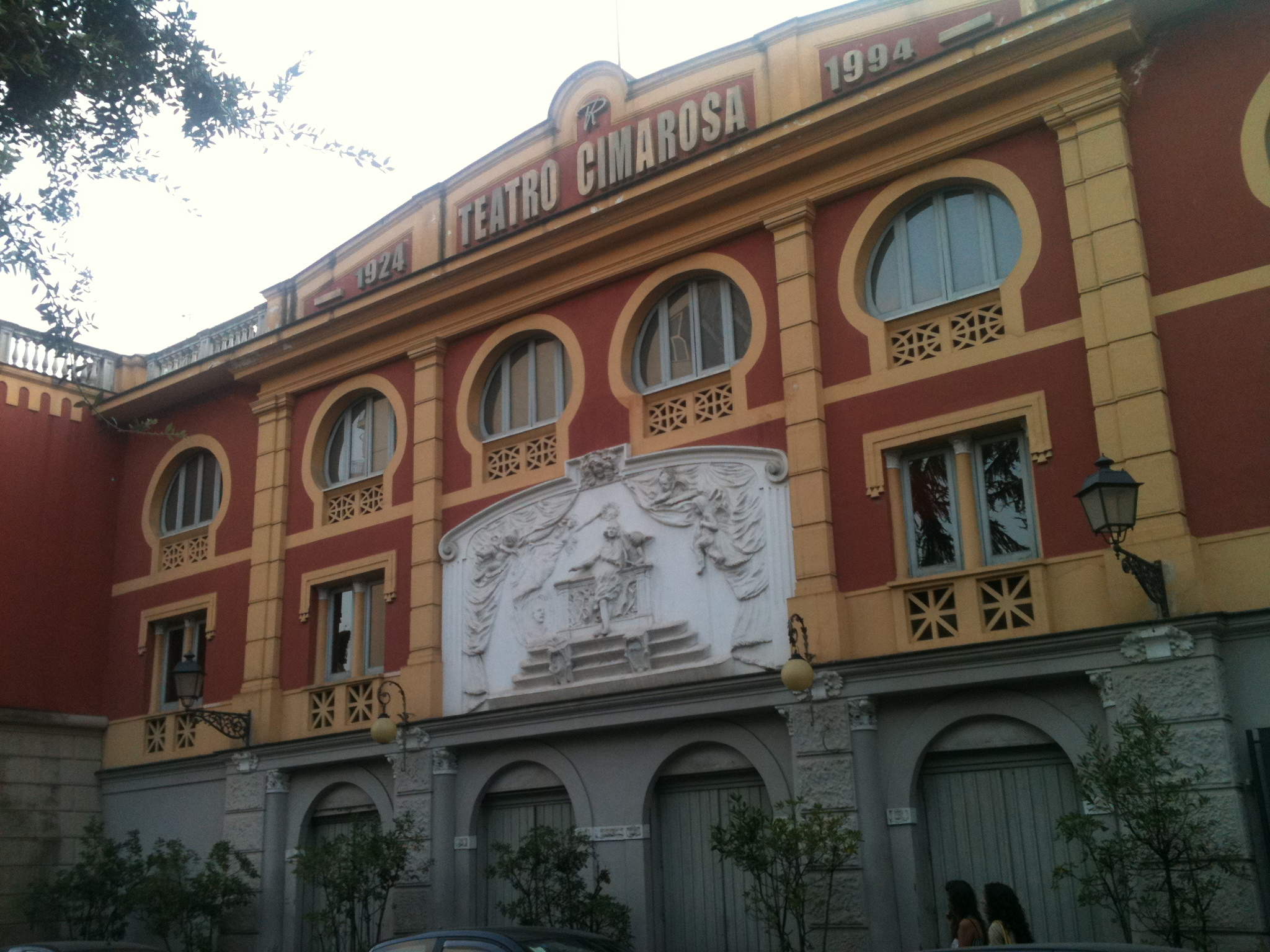 Opera propria